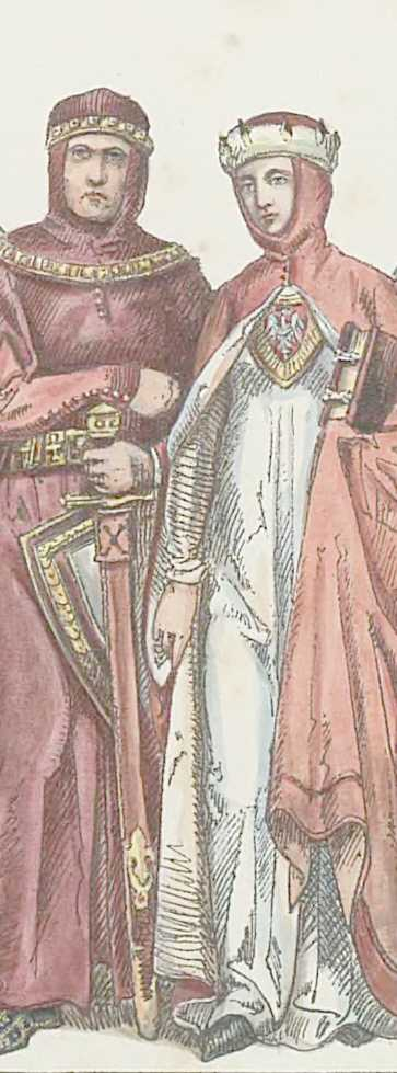 Konrad Mazowiecki i Agafia